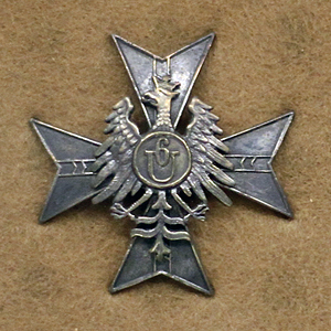 Odznaka 6 puł